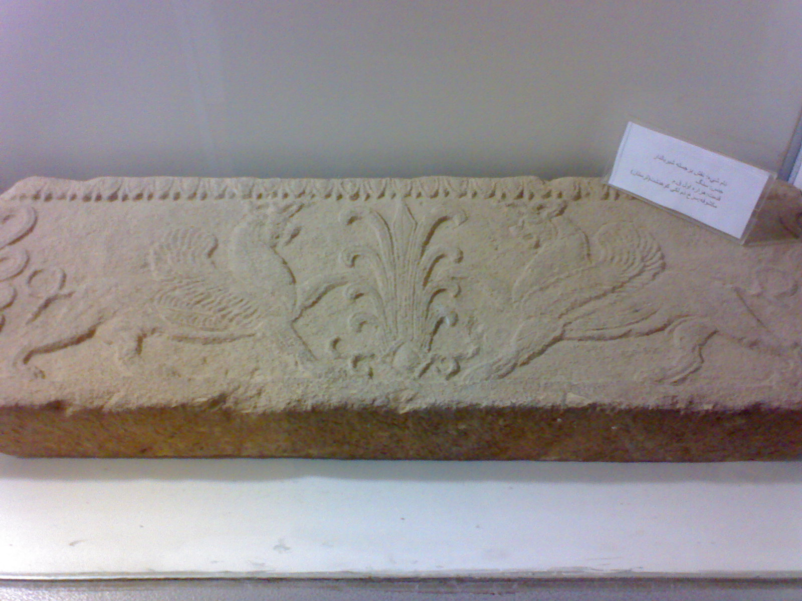 سنگ‌های حجاری شده با نقش شیربال‌دار و درخت زندگی در محوطه باستانی سرخ‌دم لکی